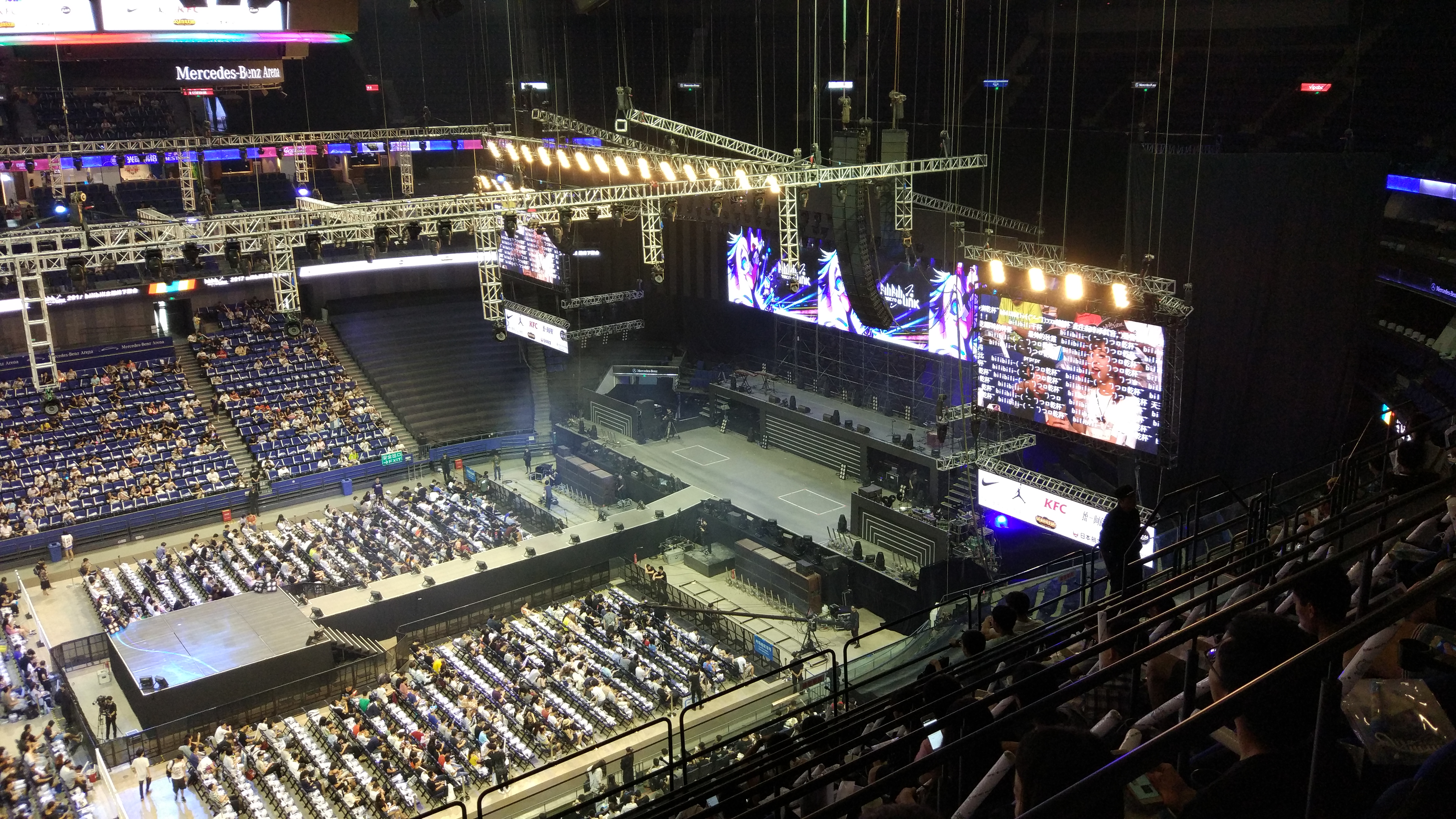 BML2017D座展示图